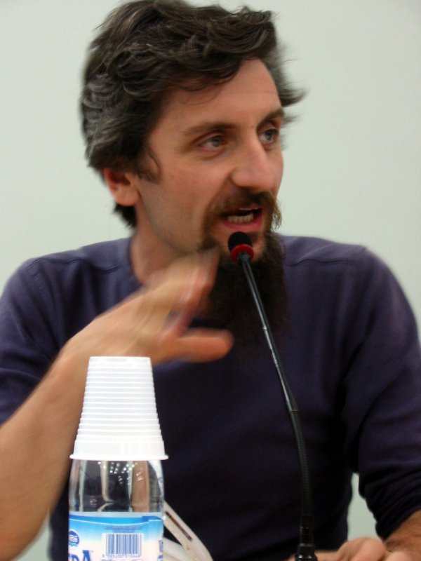 Fiera del Libro di Torino, 13 maggio 2007